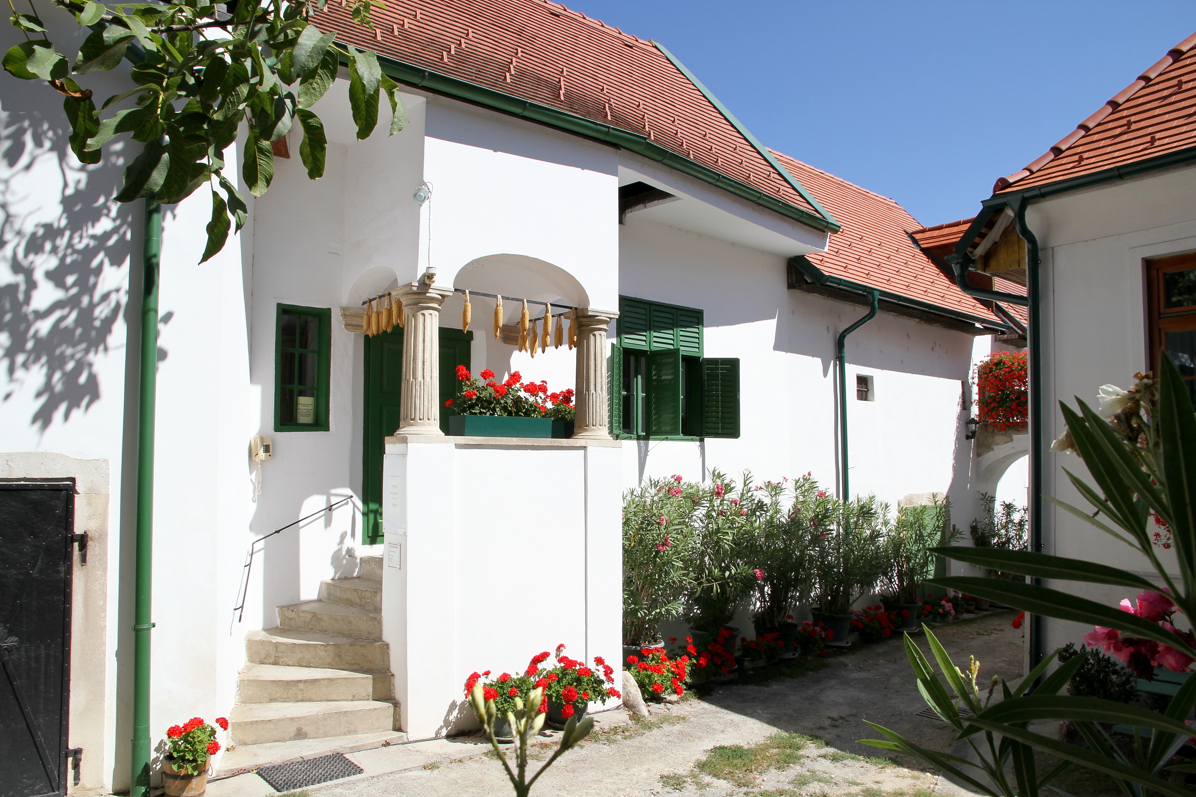 Heimathaus (Hauptstraße 53) der burgenländischen Gemeinde Mörbisch am See in einem Hofgassengebäude mit Stiegenlaube. Im Hintergrund ein Swibbogen.